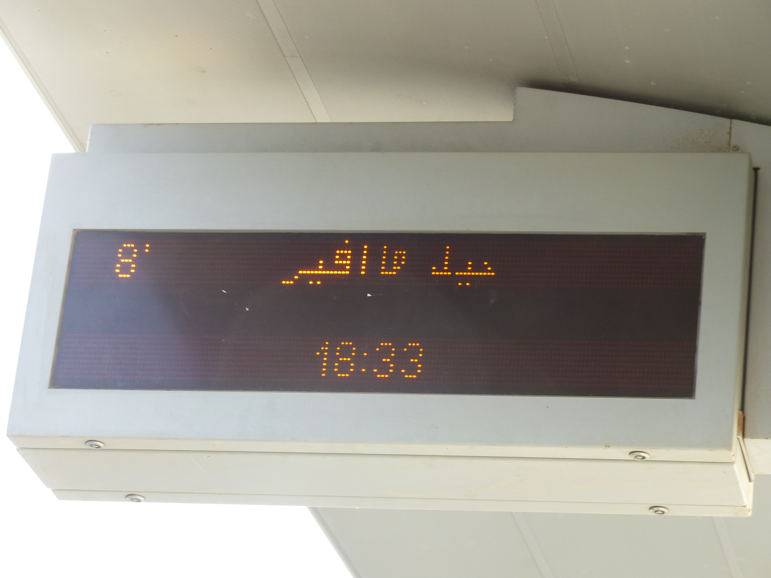 Tramway de Jérusalem : Afficheur de stationIl indique en hébreu, arabe puis anglais des messages tels que l'attente avant le prochain tram